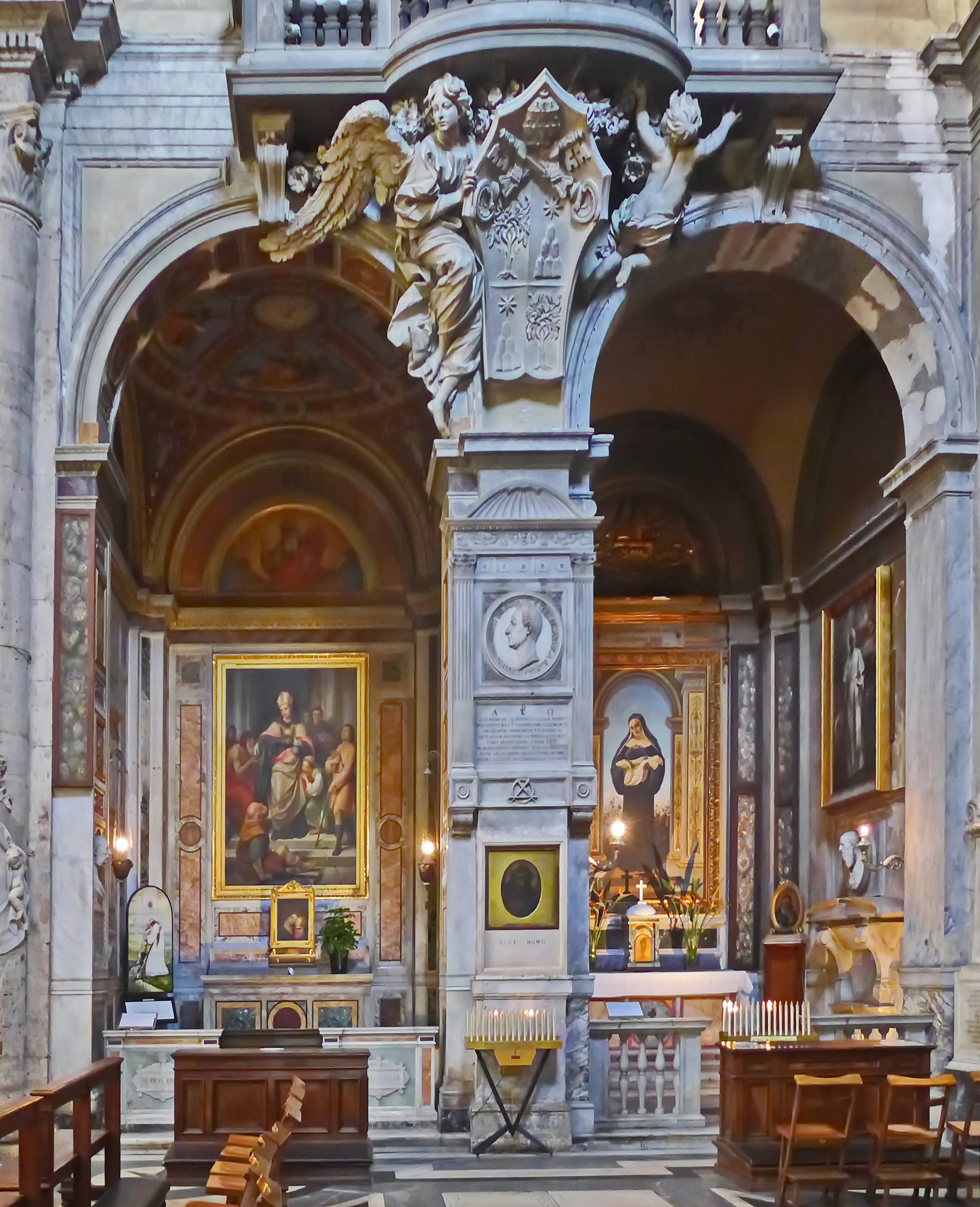 Santa Maria del Popolo Kapellen im rechten Seitenschiff